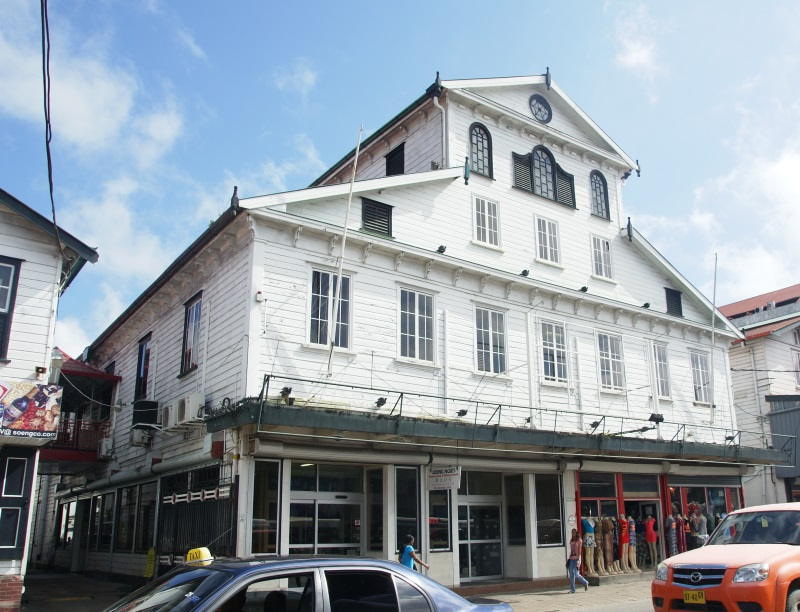 Waterkant 84, Paramaribo, Suriname